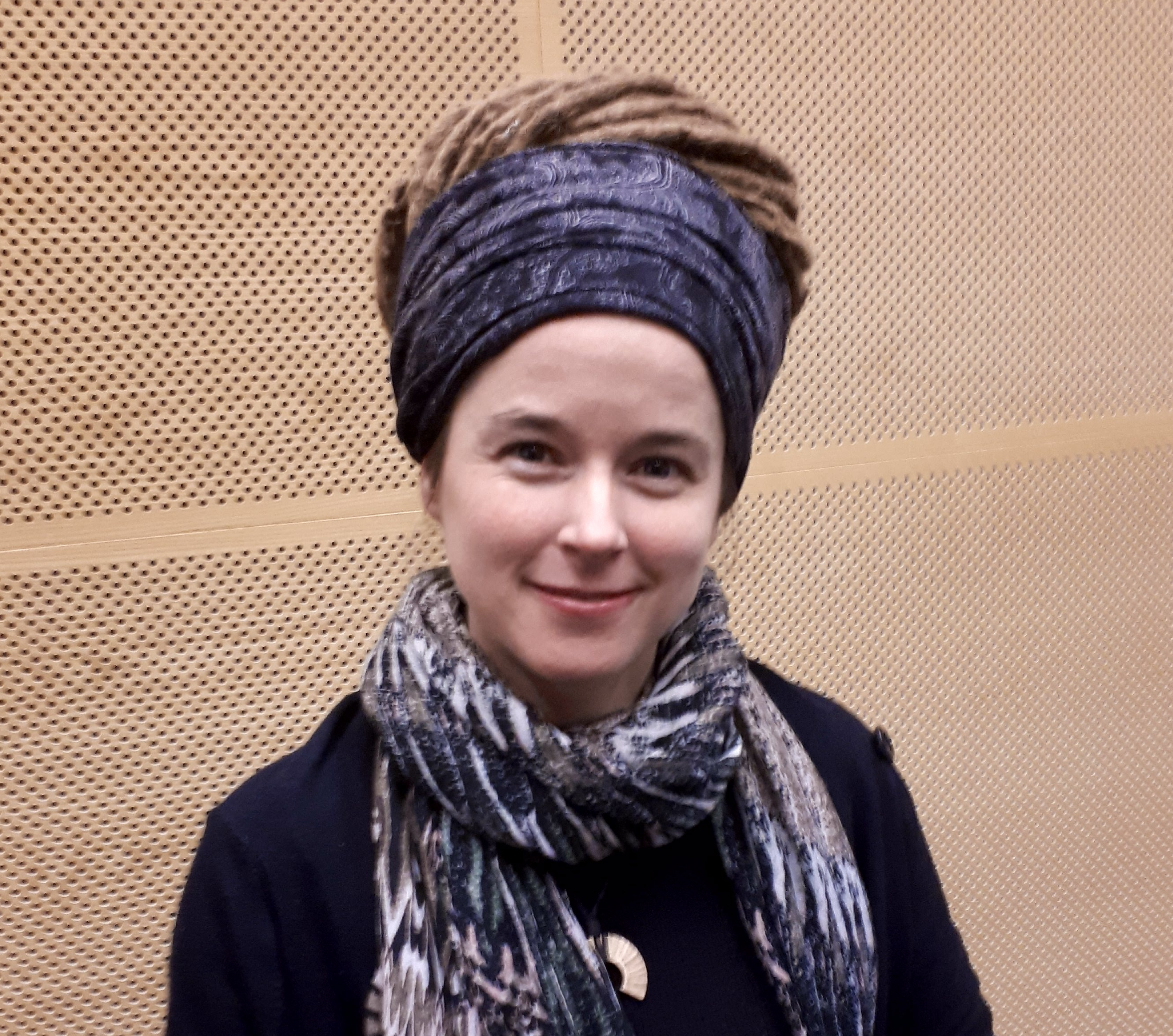 Miljöpartiet de grönas partisekreterare Amanda Lind på Kommun- och regiondagarna i Borås söndag 25 november 2018.